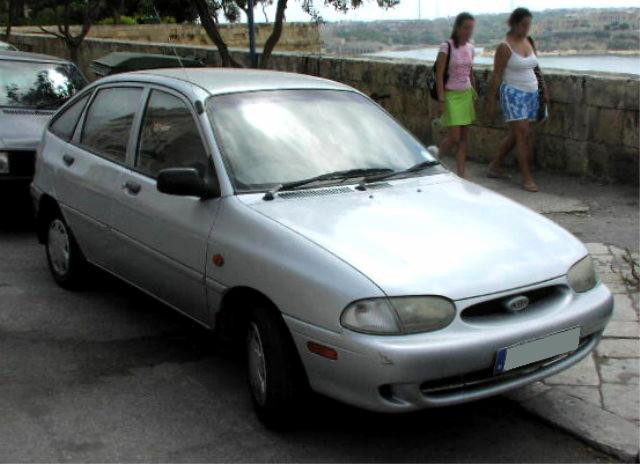 Kia Avella